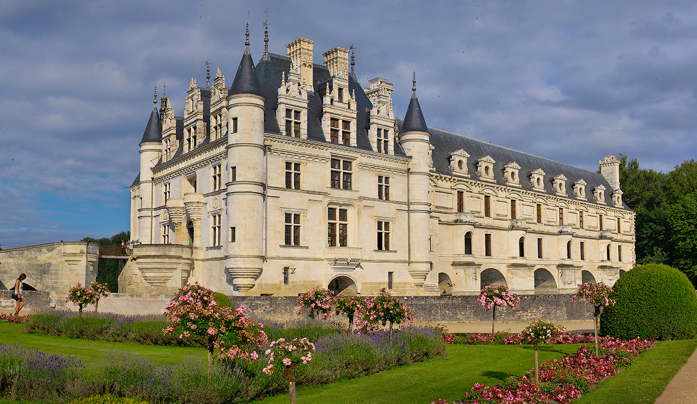 37150 Chenonceaux